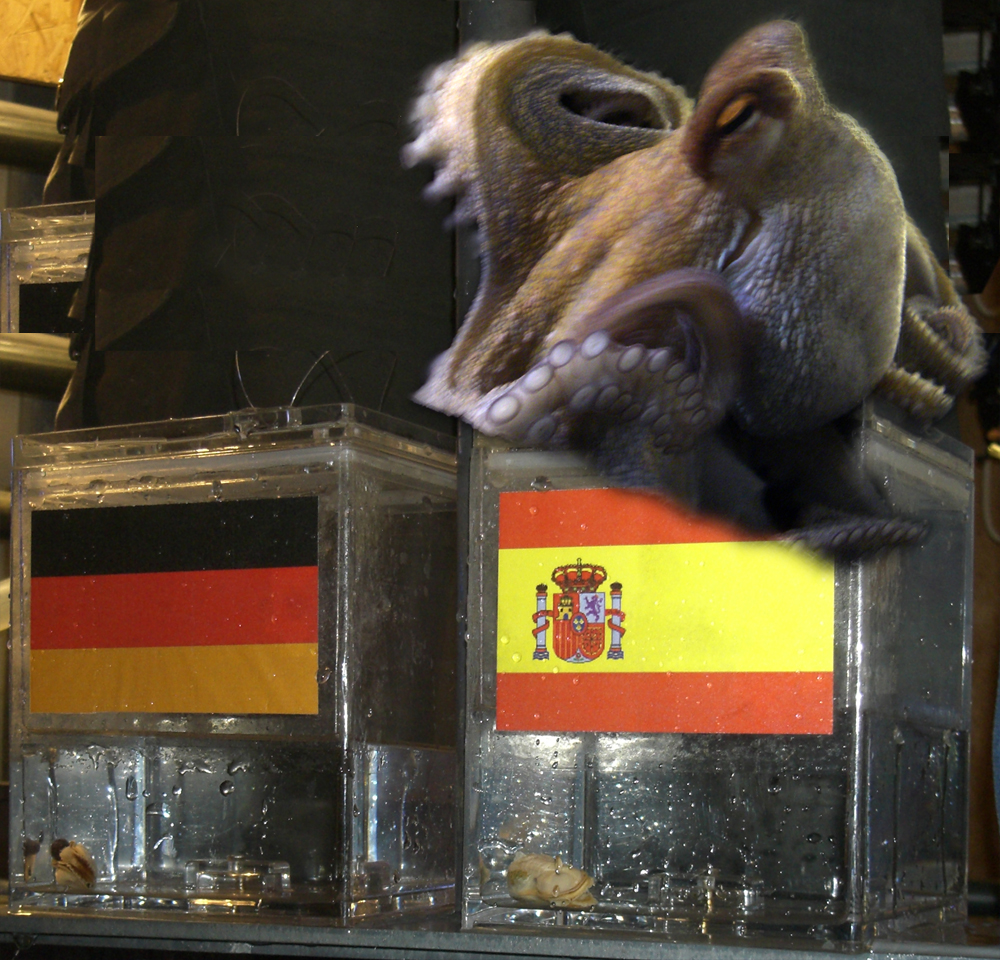 Oktopus-Orakel Paul mit Schuh.